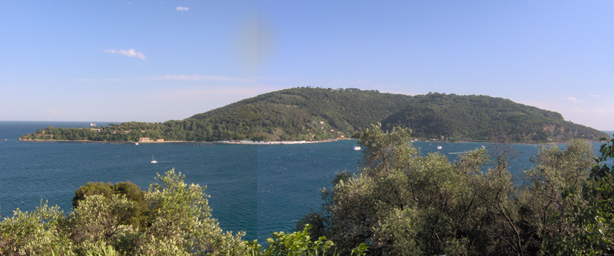 Unione di due foto dell'Isola Palmaria scattate entambre il 30 maggio 2006 alle ore 17.30 circa. William Domenichini